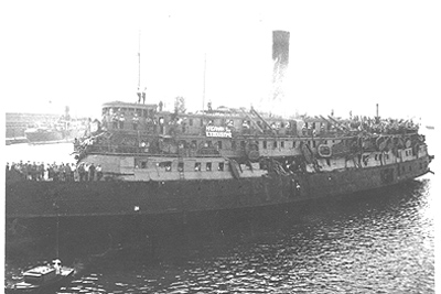 אוניית המעפילים אקסודוס